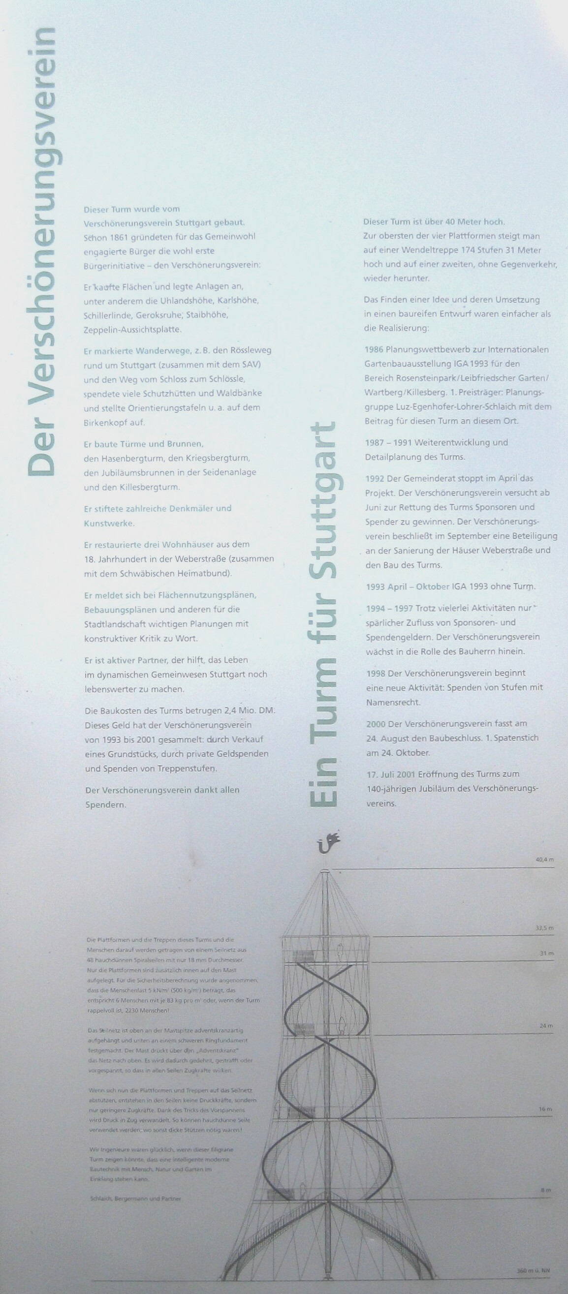 Killesbergturms, Stuttgart, Höhenpark Killesberg. – Infotafel: Der Verschönerungsverein. Ein Turm für Stuttgart.